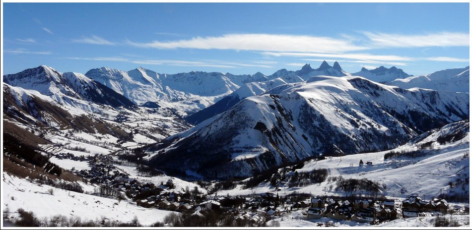 Village de Saint Surlin d'Arves en Hiver